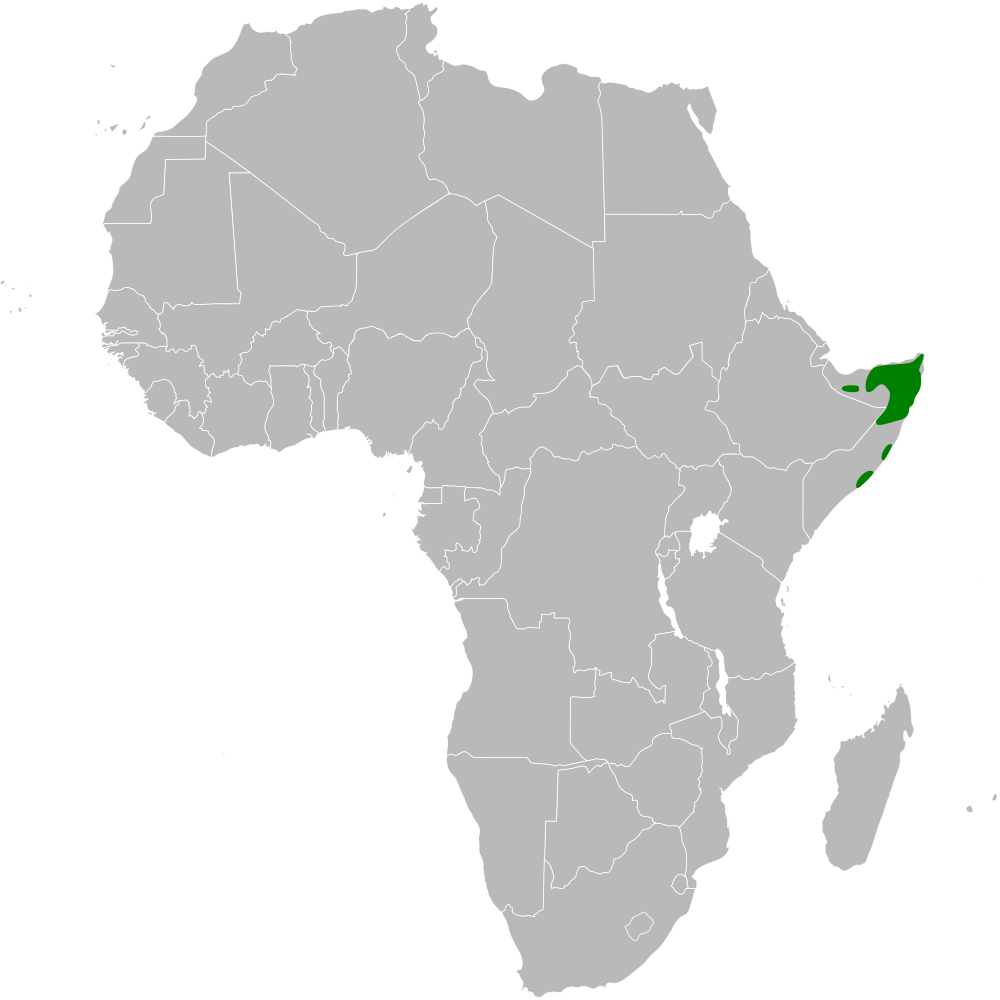 Alaemon hamertoni distribution map, based on